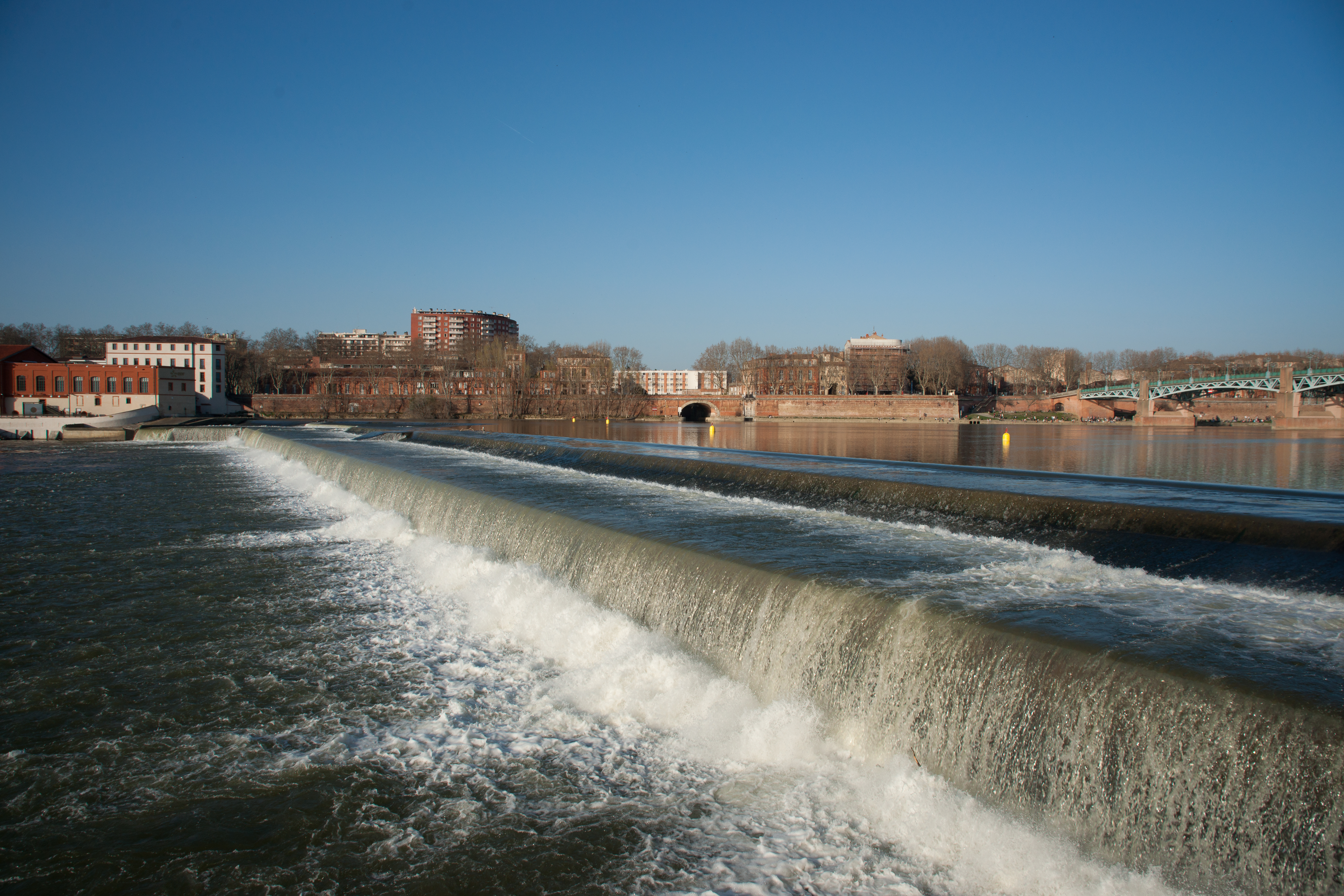 Toulouse - Seuil sur la Garonne